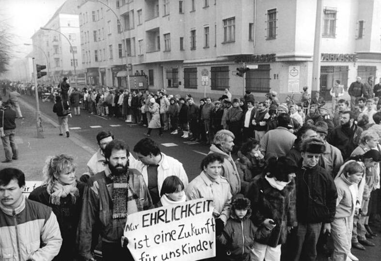 Berlin, Dimitroffstraße / Greifswalder Straße, Menschenkette ADN-ZB Schindler 3.12.89 Berlin: Menschenkette- Dicht gedrängt standen die Bürger an der Dimitroffstraße-Ecke Greifswalder Straße. Dort stießen die Menschenketten von der F 96 und der F 2 aneinander.